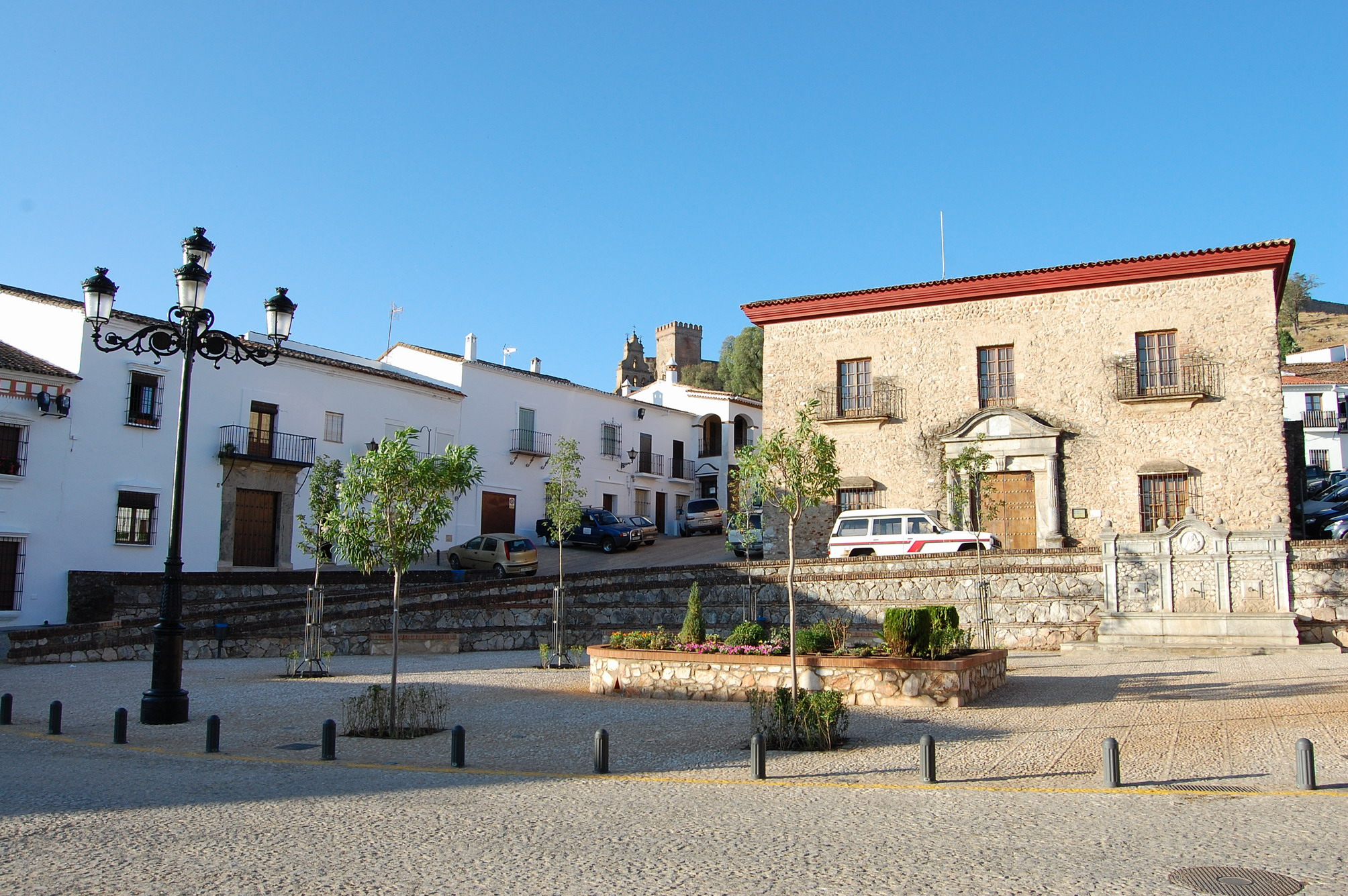 Cabildo Viejo de Aracena